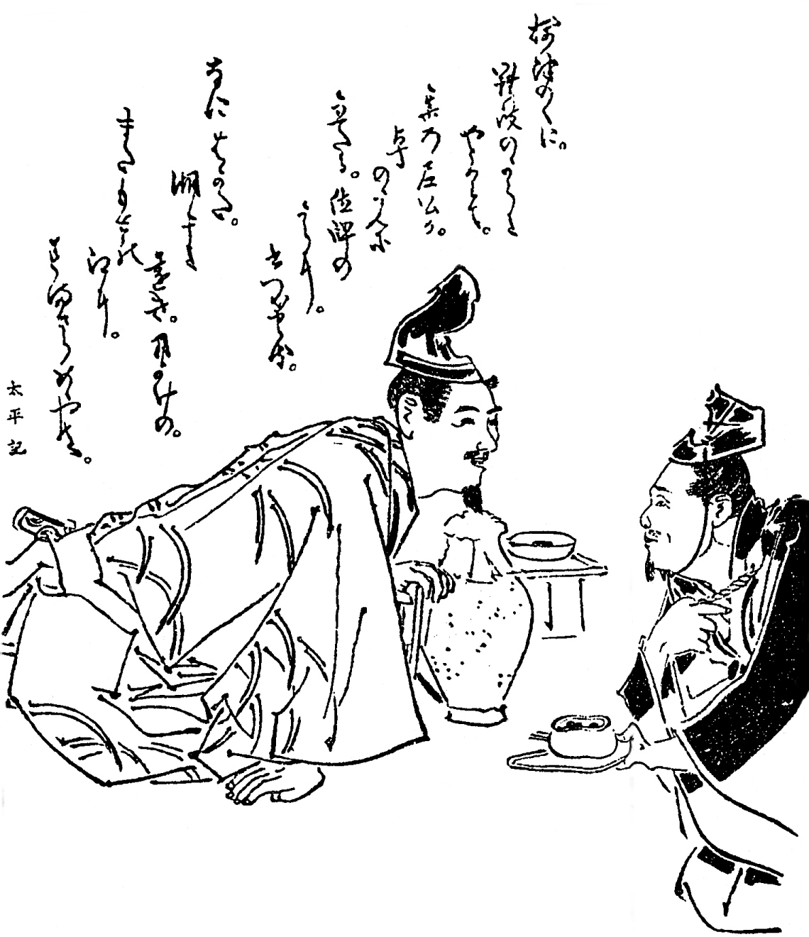 『徒然草』の北条時頼と北条（大仏）宣時。鎌倉時代中期の人物。／江戸時代『前賢故実』より。画：菊池容斎